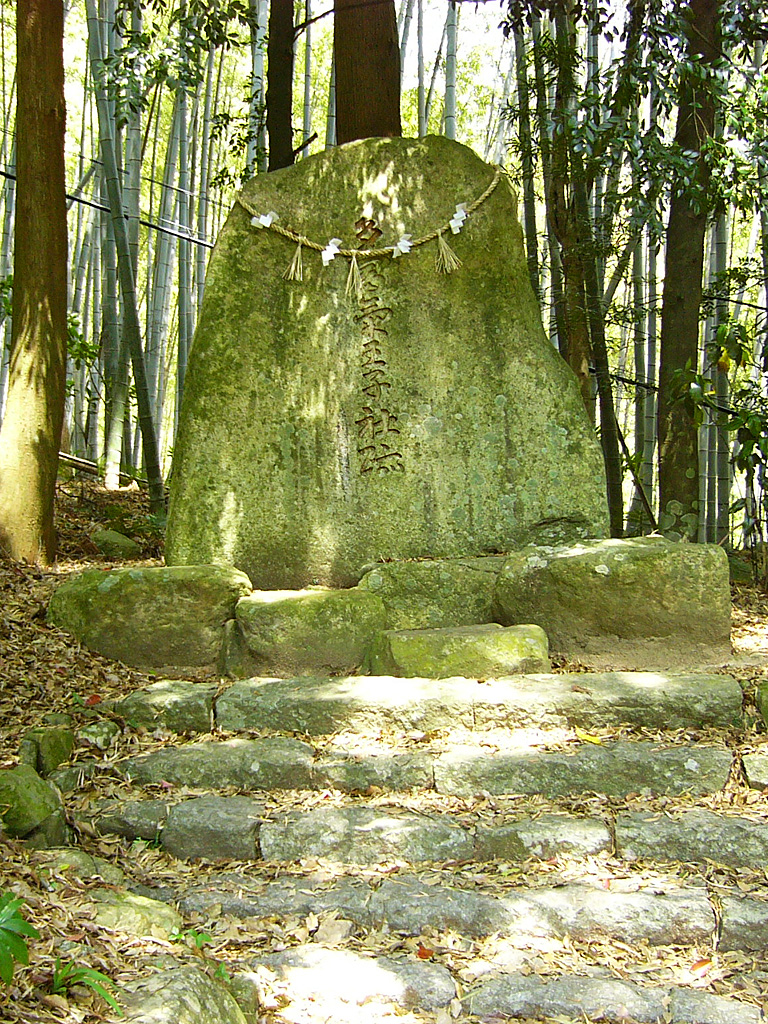 Daimonzaka in Nachikatsuura, Wakayama